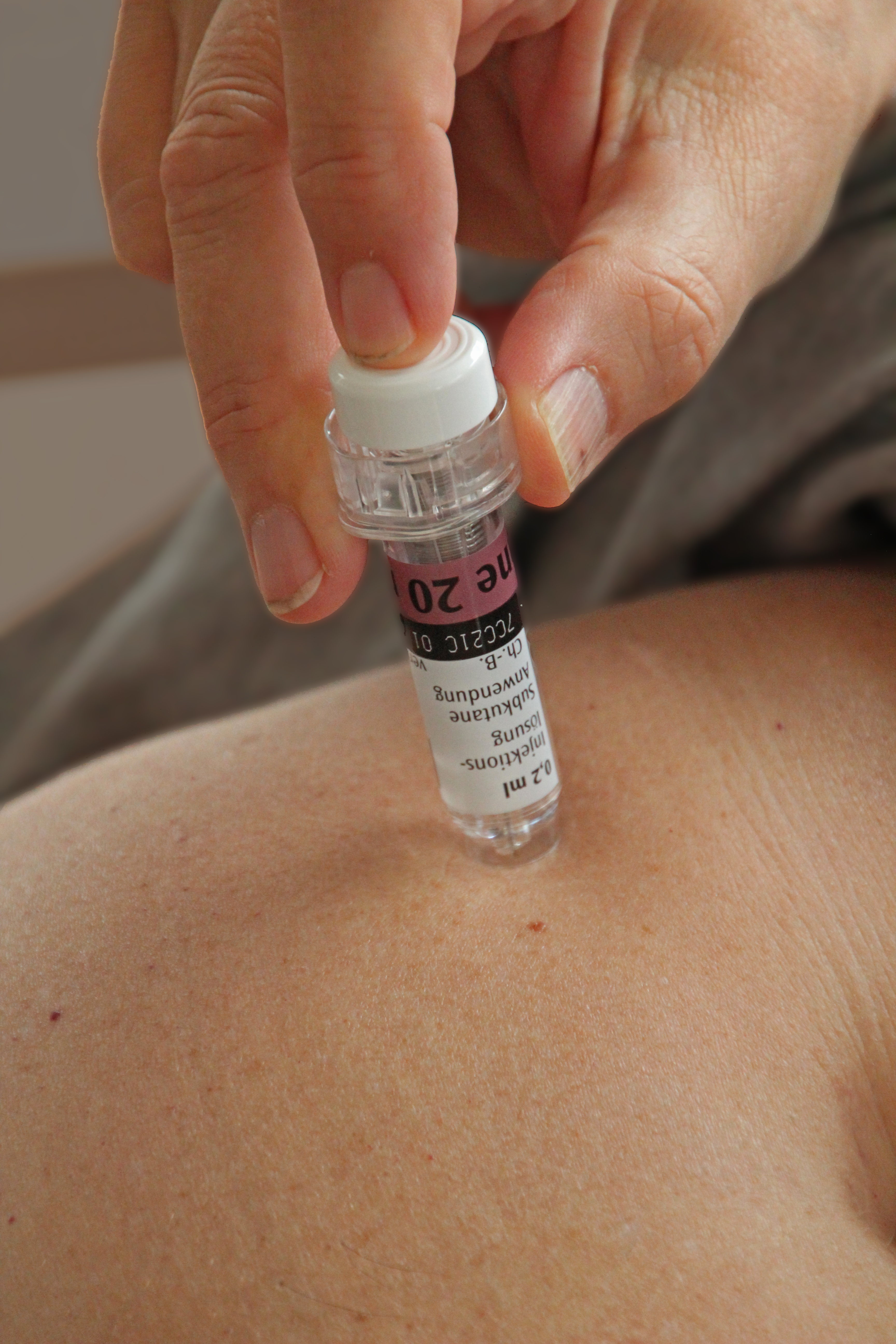 Bildinhalt: Thrombose-Fertigspritze mit 20 mg Clexane (Enoxaparin-Natrium) der Firma Sanofi-Aventis. Anwendung im Bauchbereich. Aufnahmeort: Frankfurt am Main, Deutschland